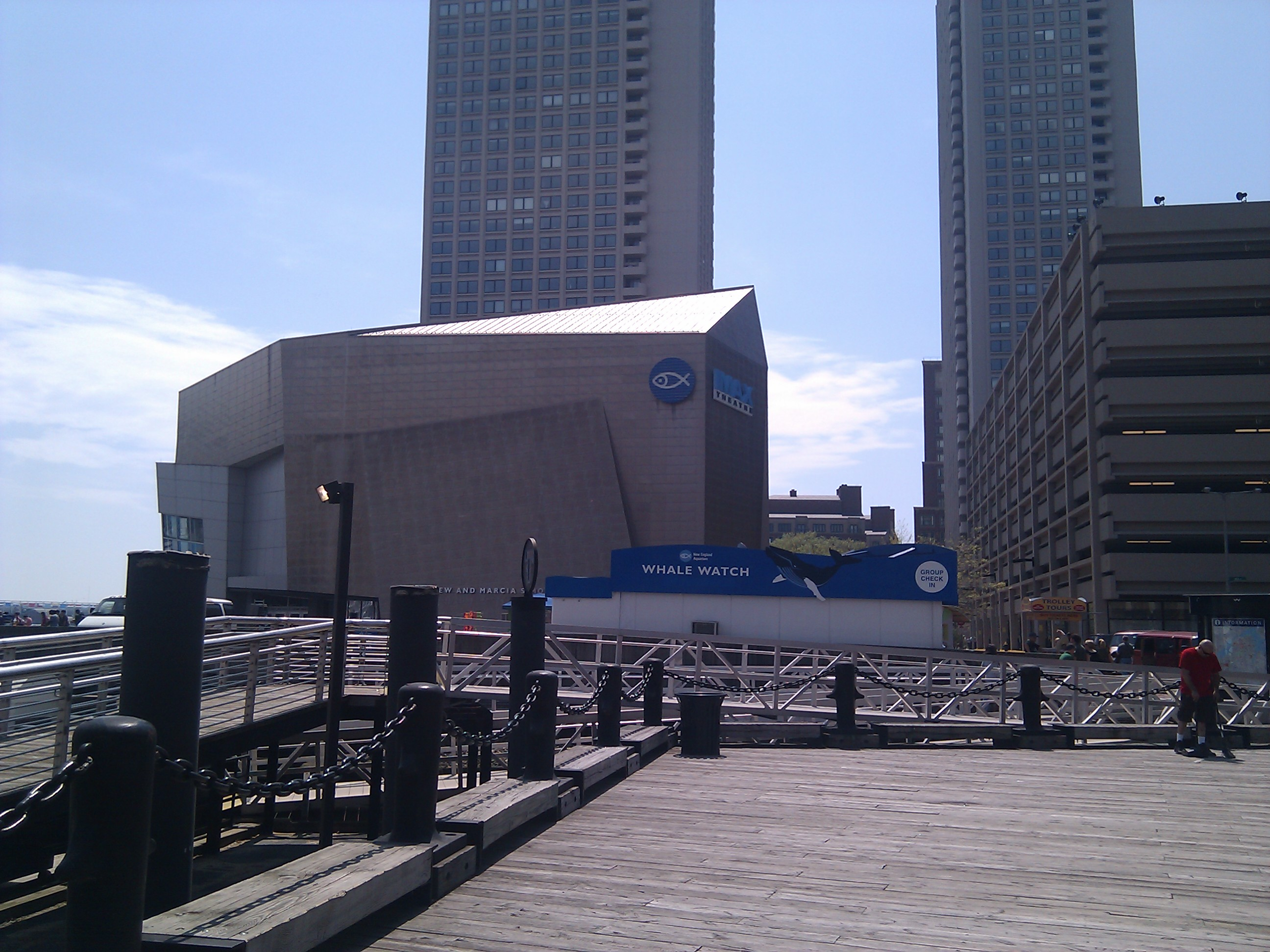 Boston